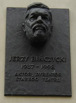 Tablica pamiątkowa, upamiętniajaca aktora Jerzego Bińczyckiego. Stary Teatr w Krakowie.